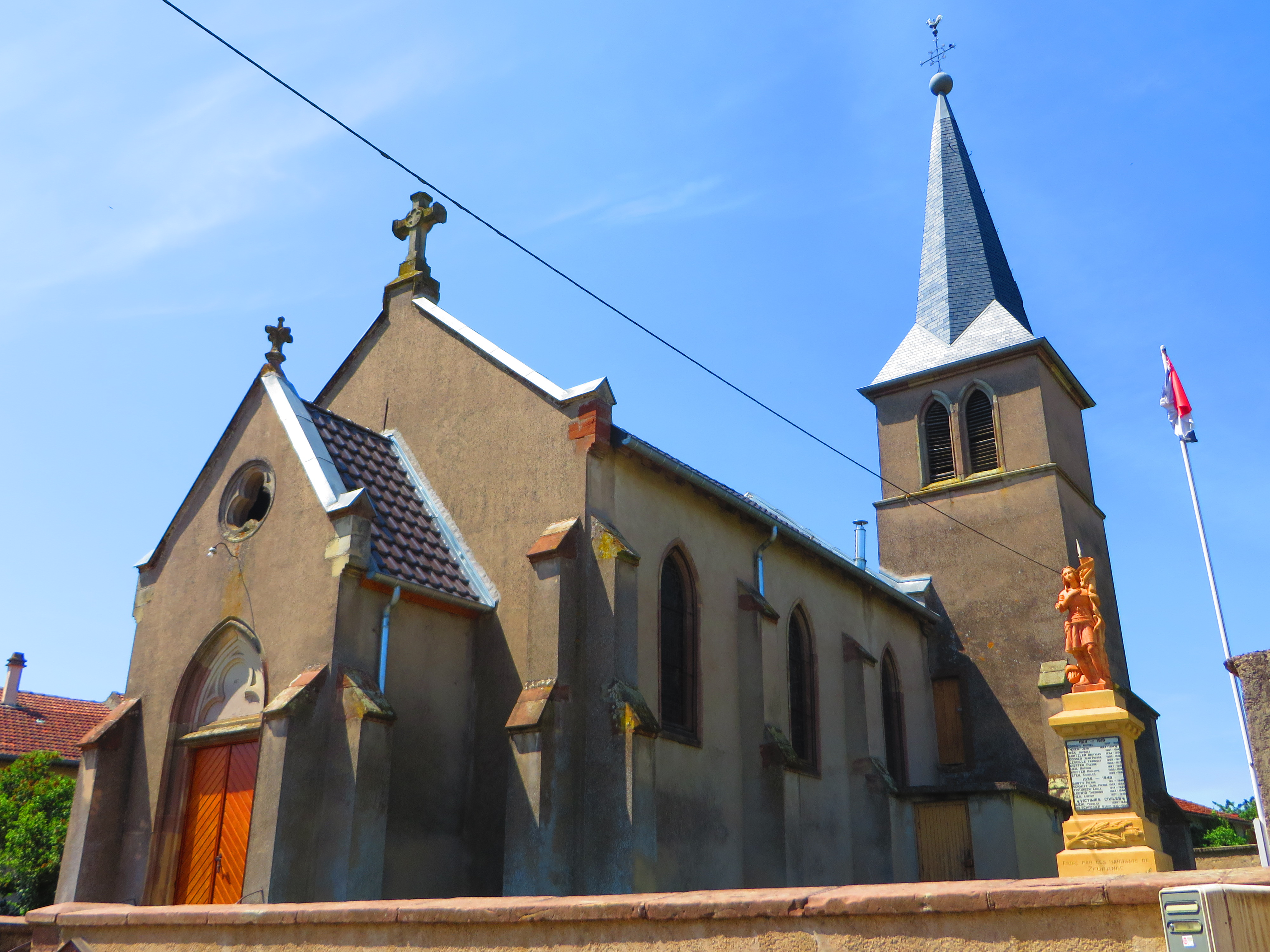 Flastroff Zeurange eglise